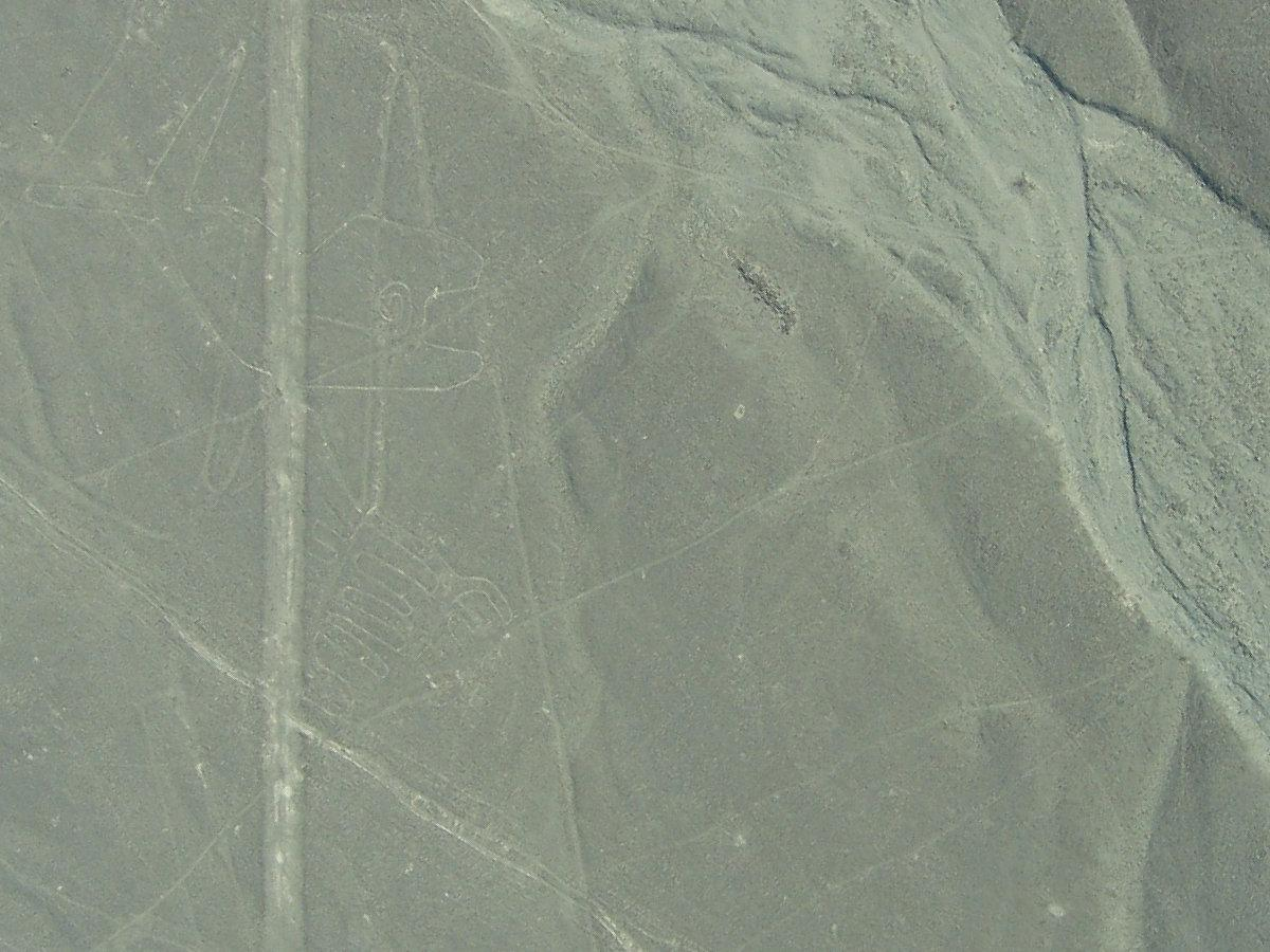 Nasca (Peru), Whale, August 2007